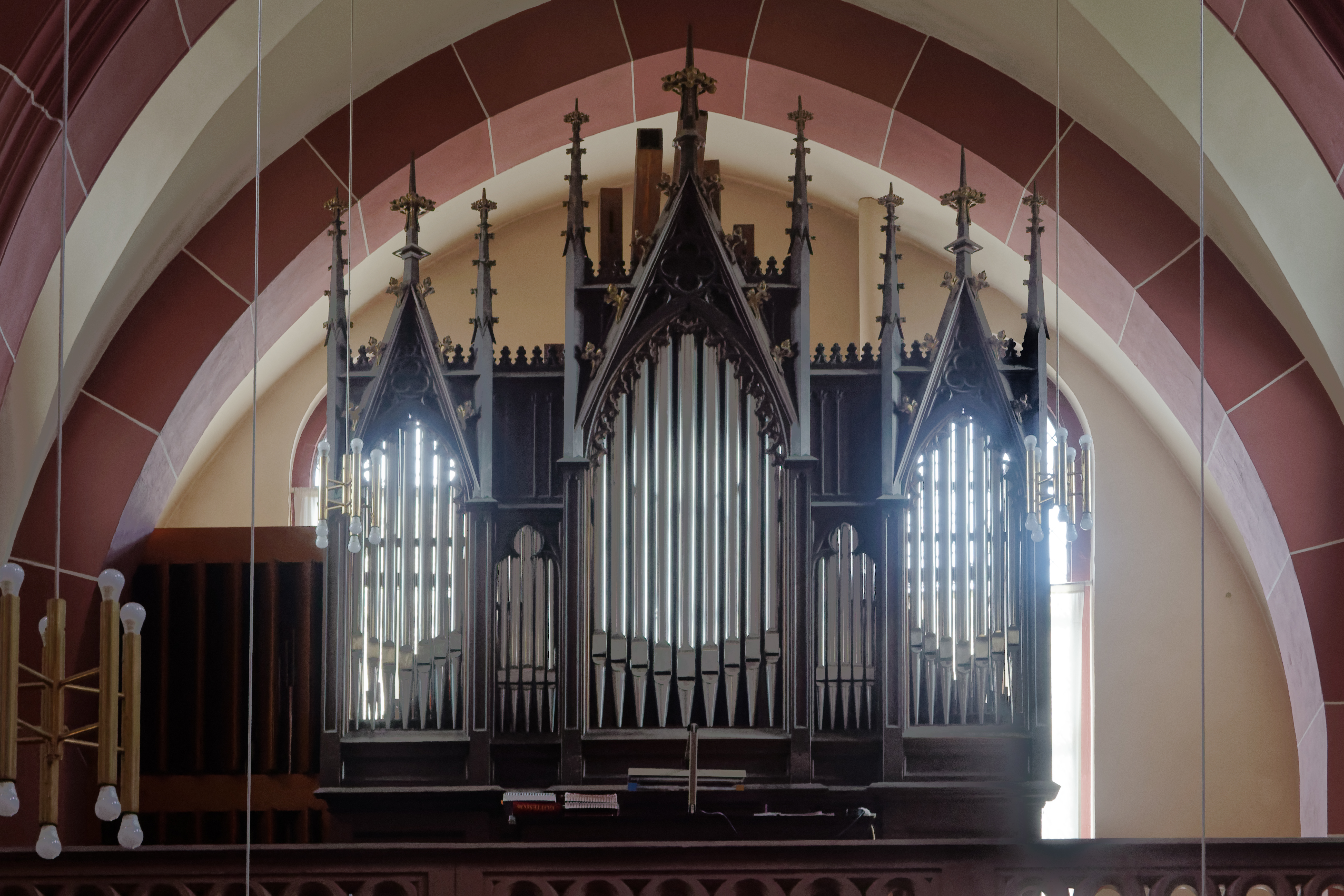 der katholischen Kirche St. Nikolaus in Jügesheim (Rodgau, Hessen).